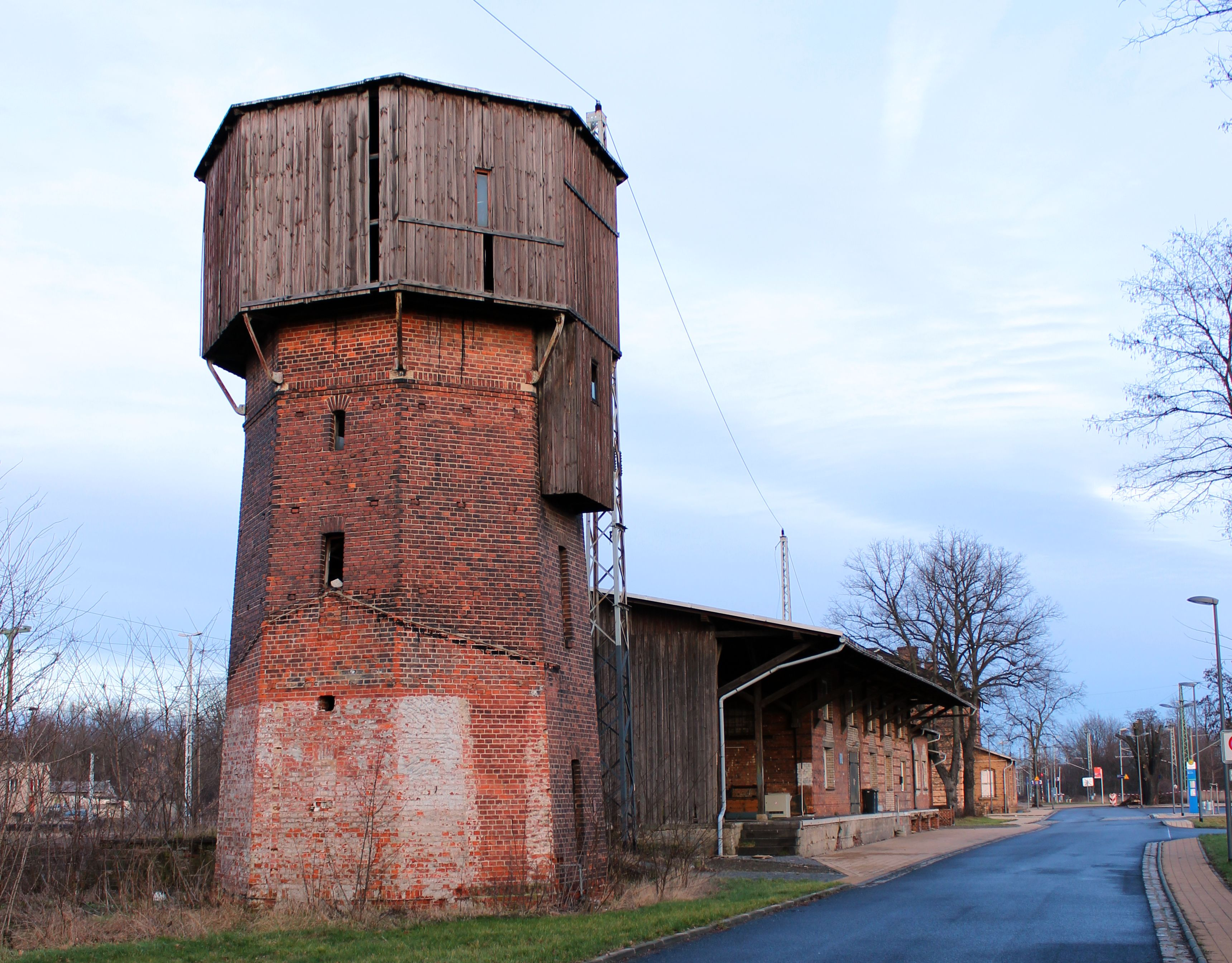 Bahnhof Elsterwerda-Biehla.